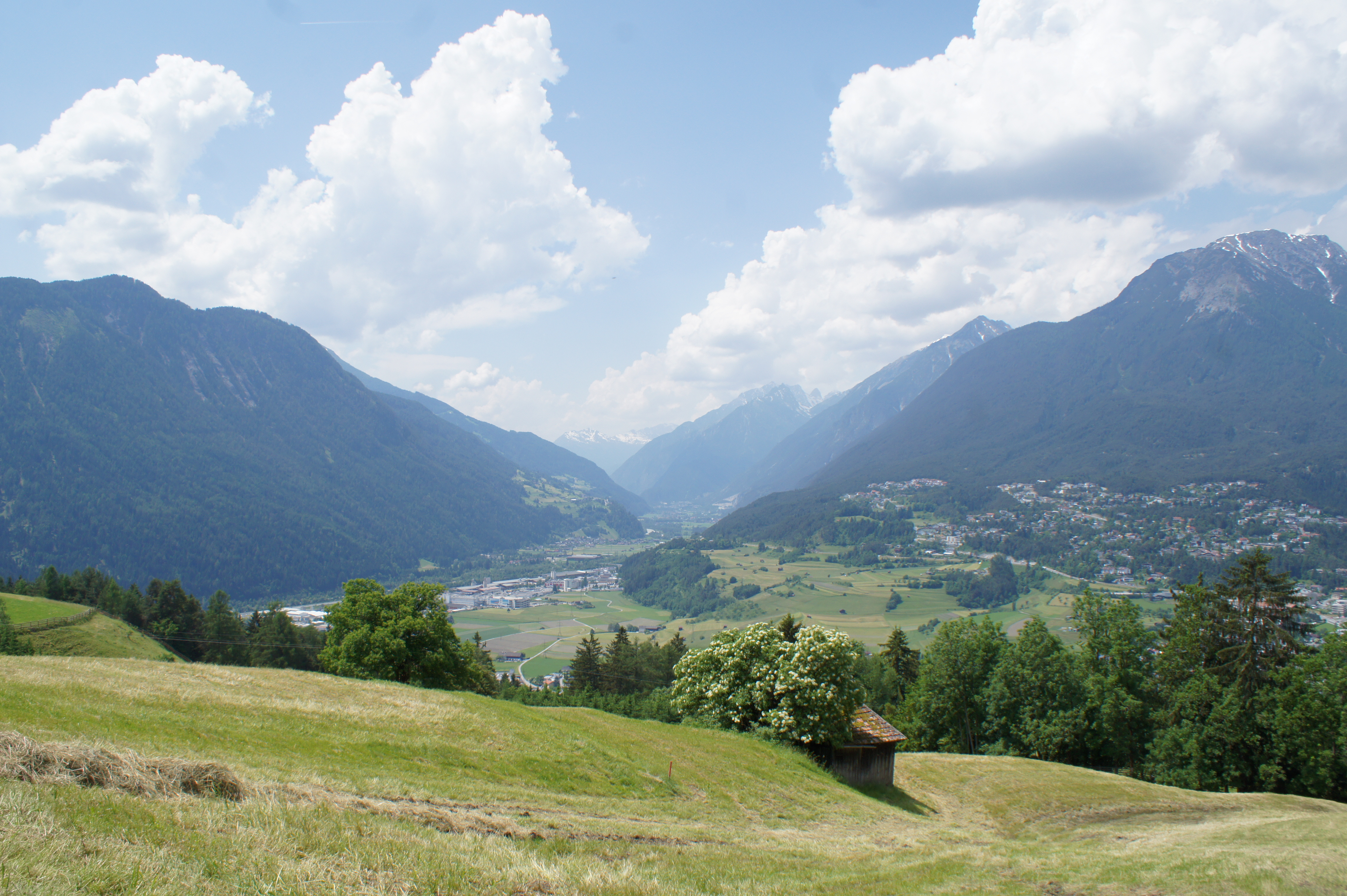 Edelkastanie nordwestlich von Karrösten This media shows the natural monument in the Tyrol with the ID ND_2_11.